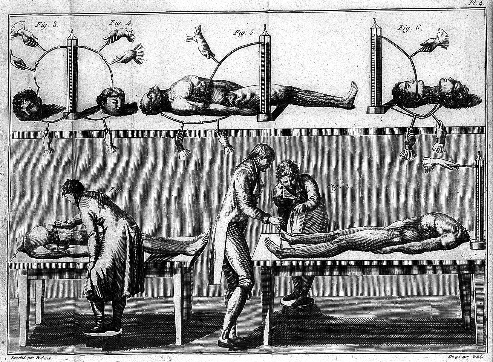 Galvanism experiments. Rare Books